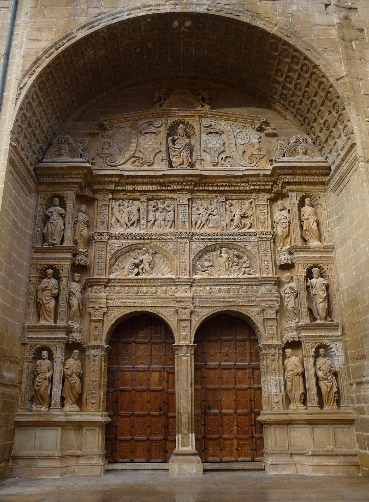 Iglesia de Santo Tomás. Haro, La Rioja (España) - Portada principal. Obra de Felipe Bigarny.